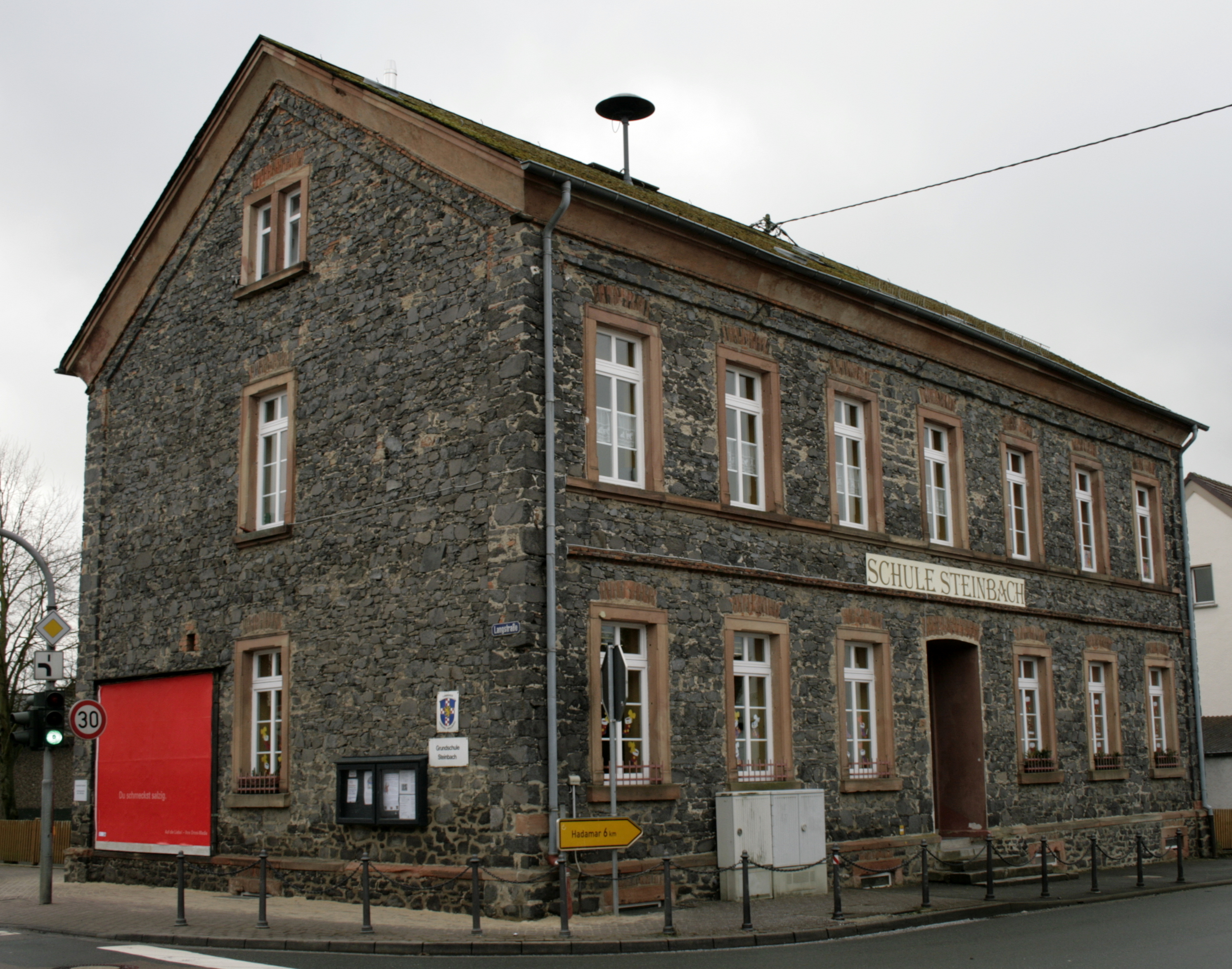 Grundschule in Hadamar-Steinbach, Deutschland